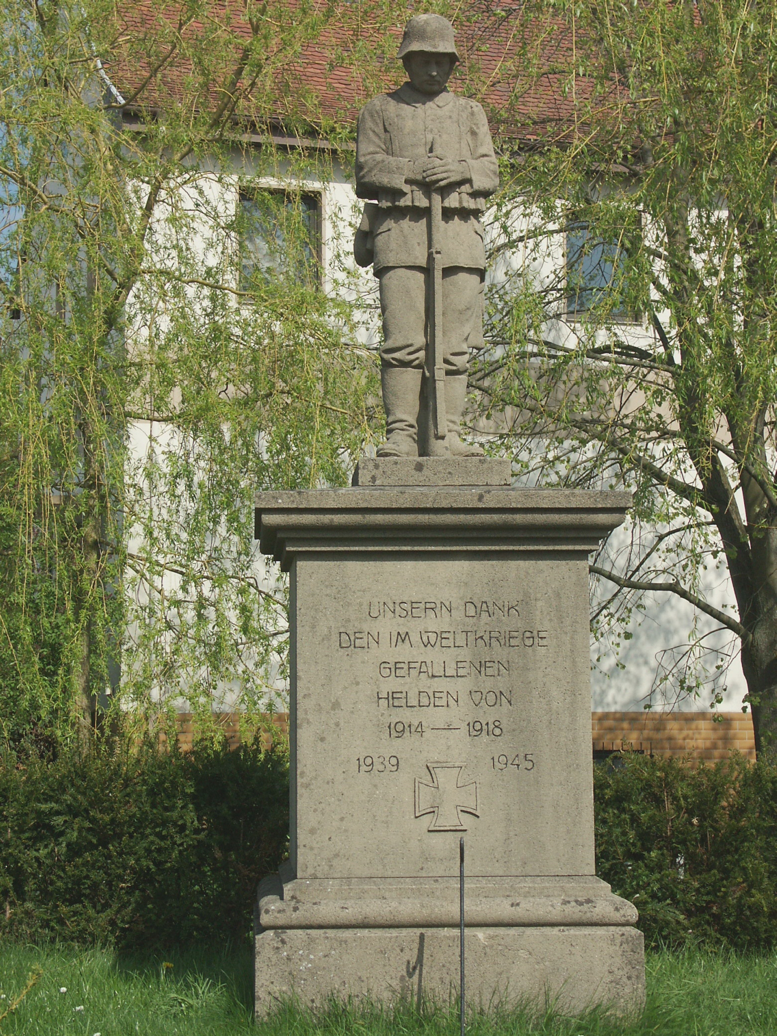 War Memorial - Krieger-/Kriegsopferdenkmal - Mémorial de guerre